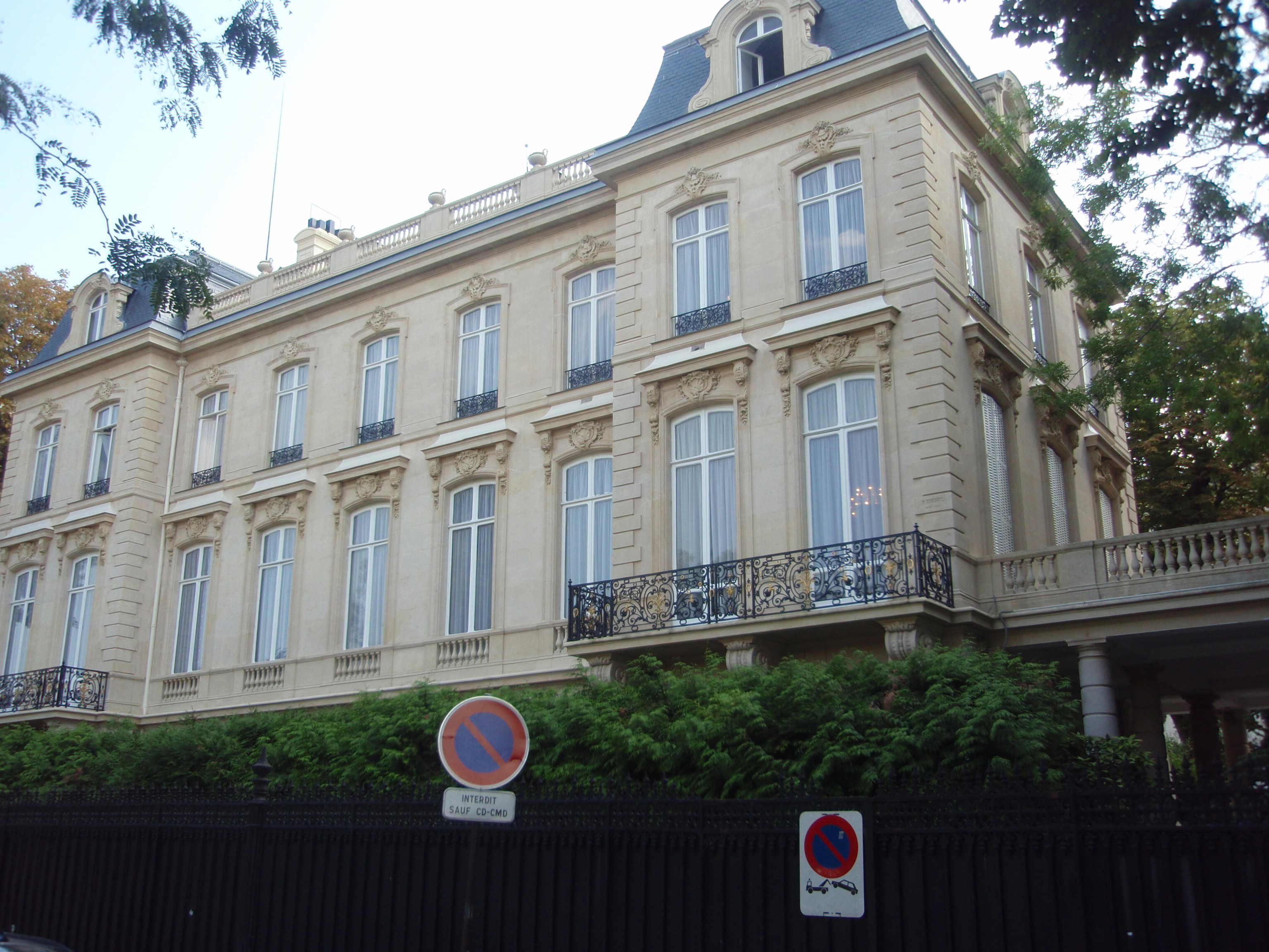 Ambassade de l'Angola au n° 19 (et non 41 !) de l'avenue Foch à Paris